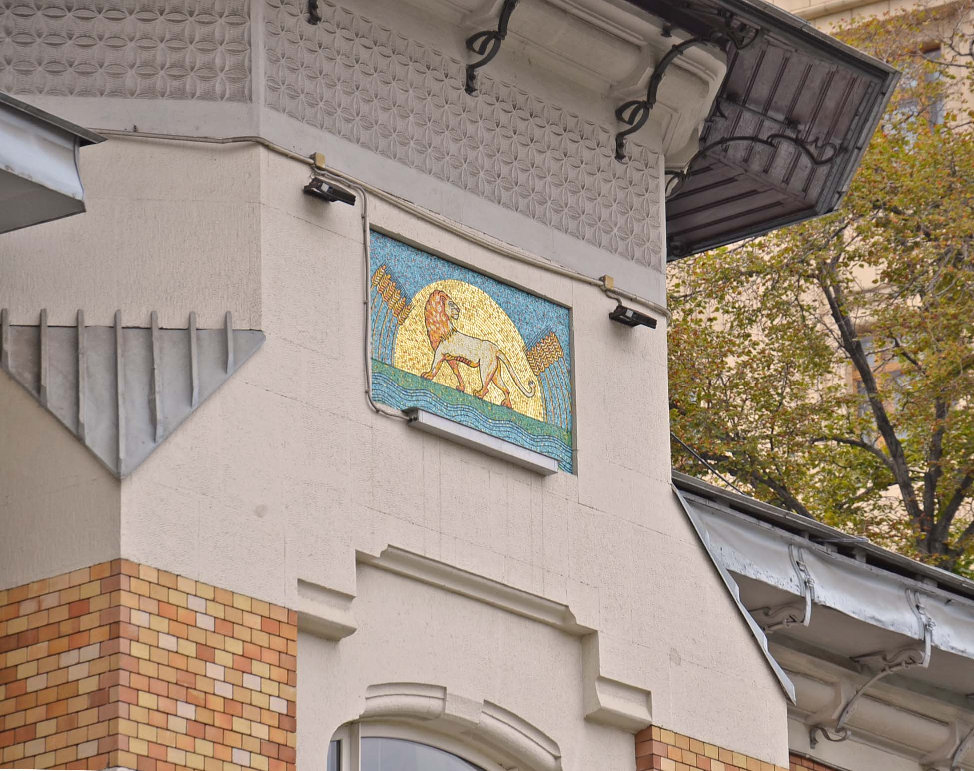 Мозаичное панно на боковом ризалите особняка Листа